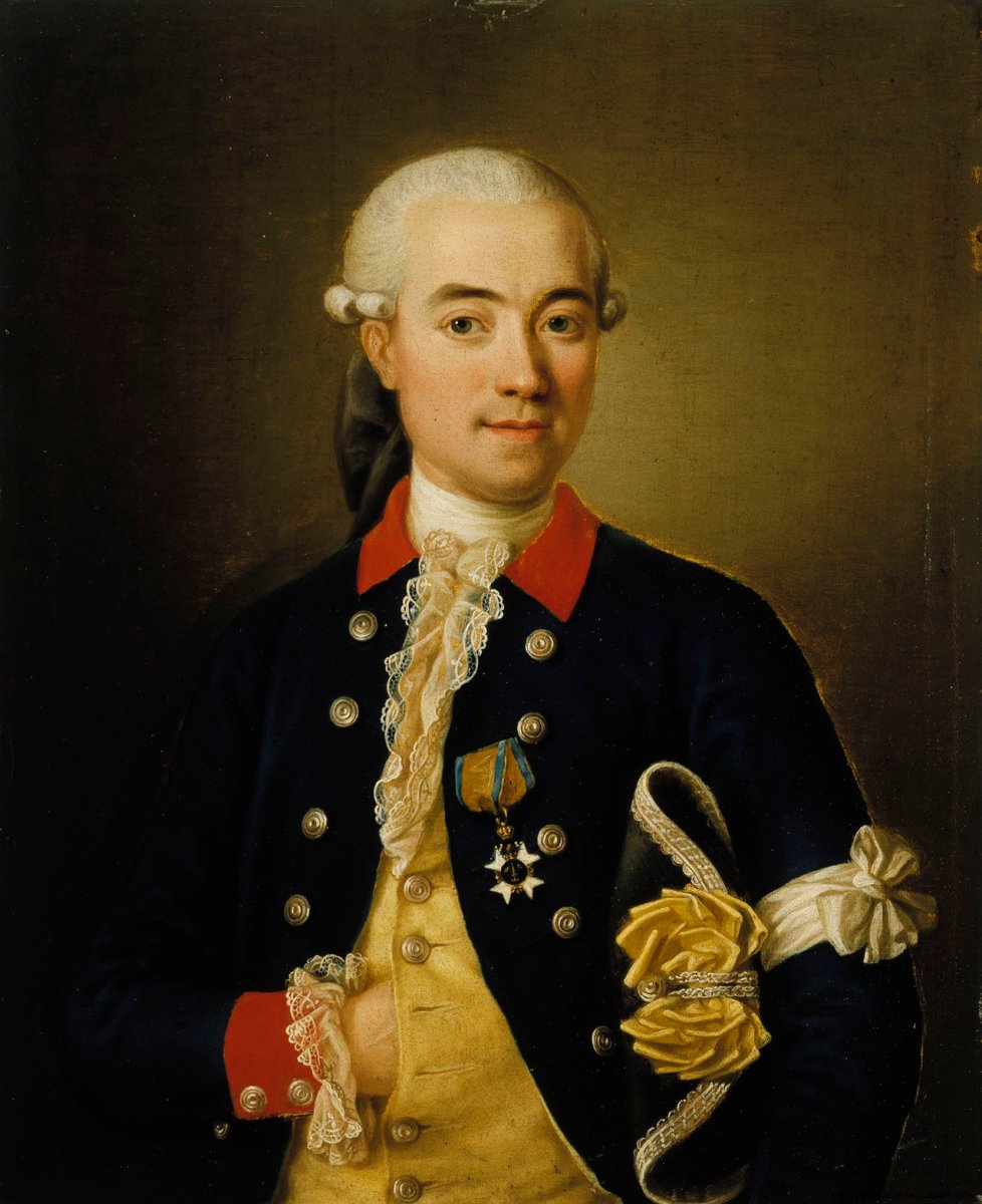 Porträtt av Carl Adolf Möllerswärd iklädd uniform för en kapten vid Kronobergs regemente. På bröstet bär han Svärdsordens riddartecken, och under vänster arm bär han en tricorne. Runt hans vänstra överarm syns en vit armbindel, som var en detalj i den svenska officersuniformen efter Gustav III:s statsvälvning den 19 augusti 1772. Målning från 1775 av Ulrika Pasch.